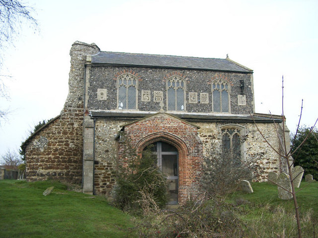 Feltwell St Nicholas Church